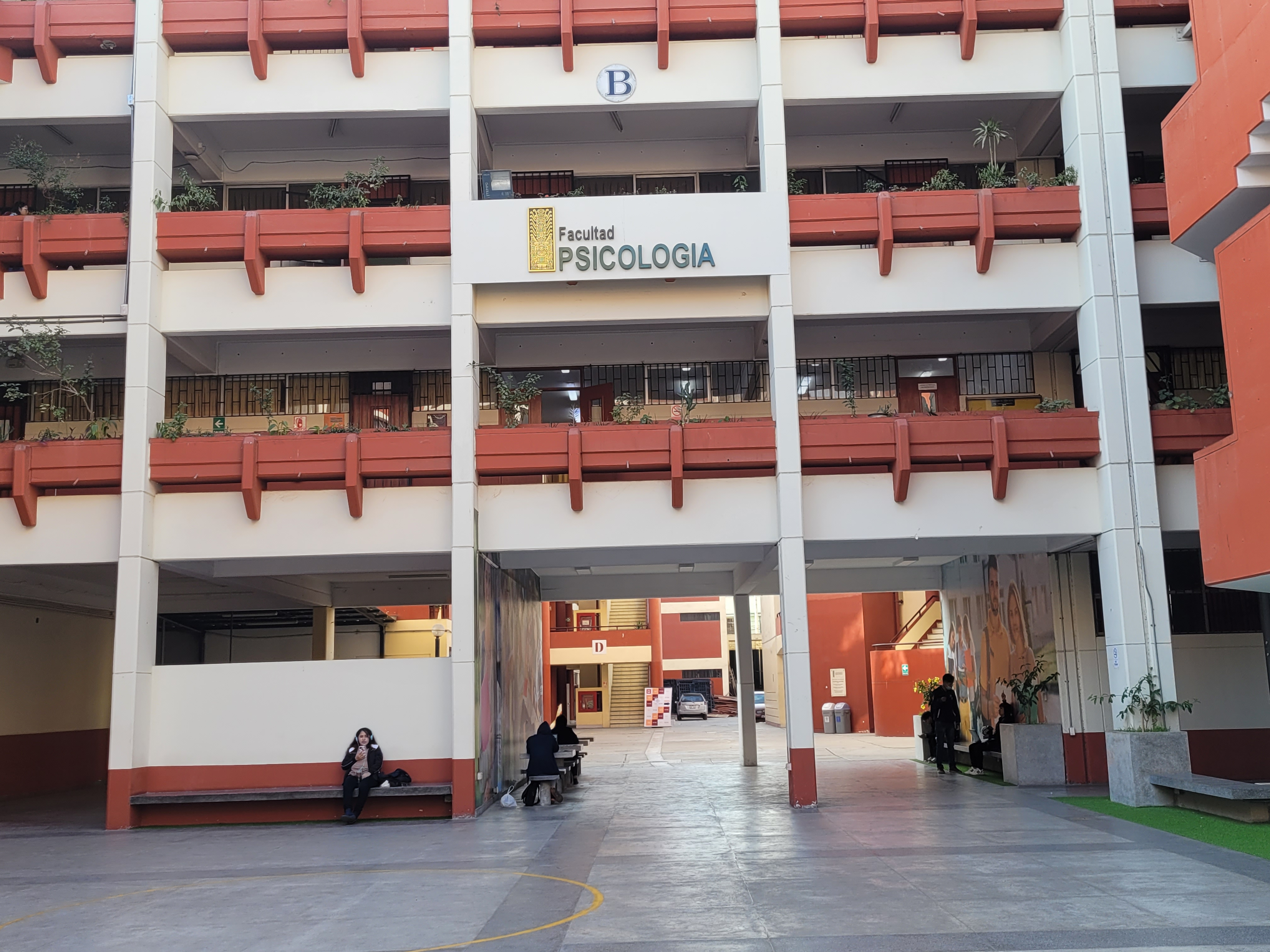 Facultad de Psicologia de la universidad Federico Villarreal